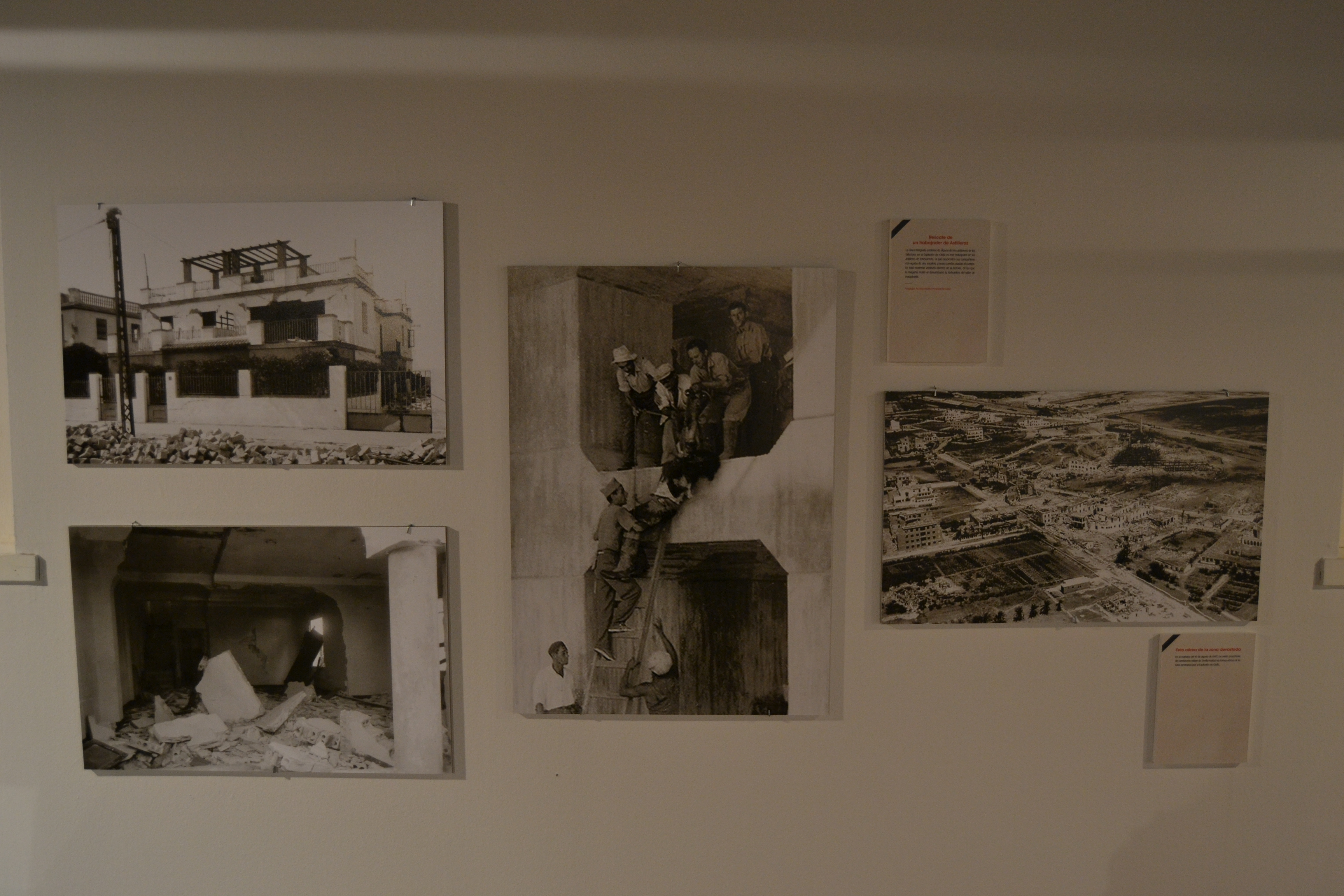 Exposición "La Explosión de Cádiz de 1947"